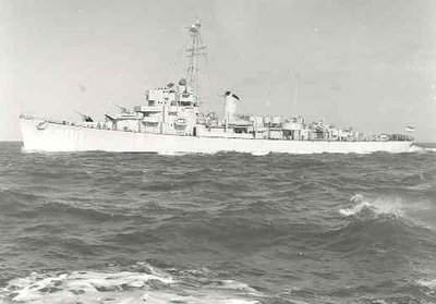 Hr.Ms. van Ewijck in de Noordzee.